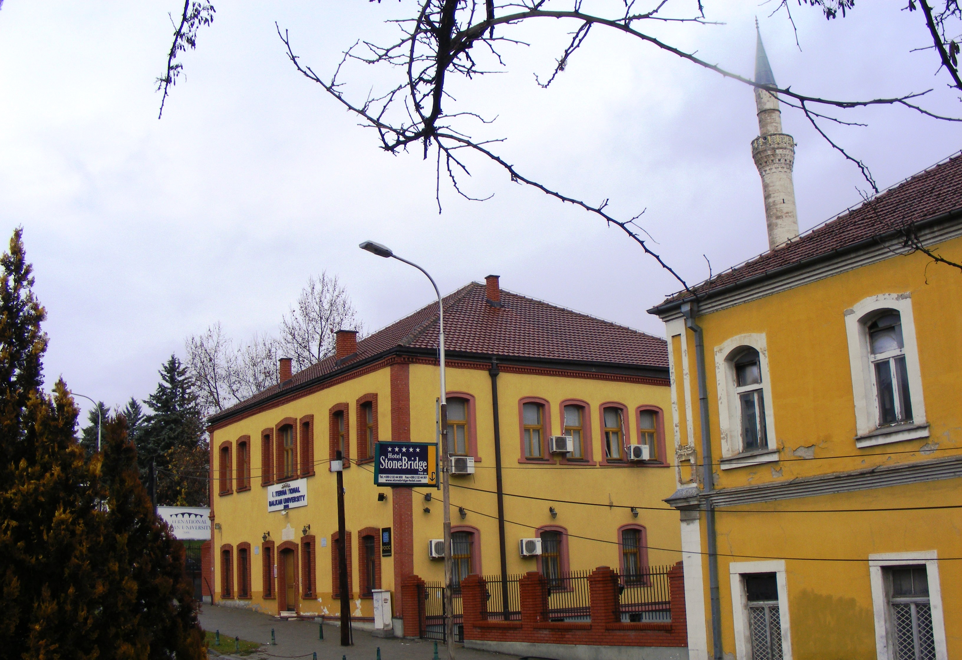 Posta e vjetër turke në Shkup